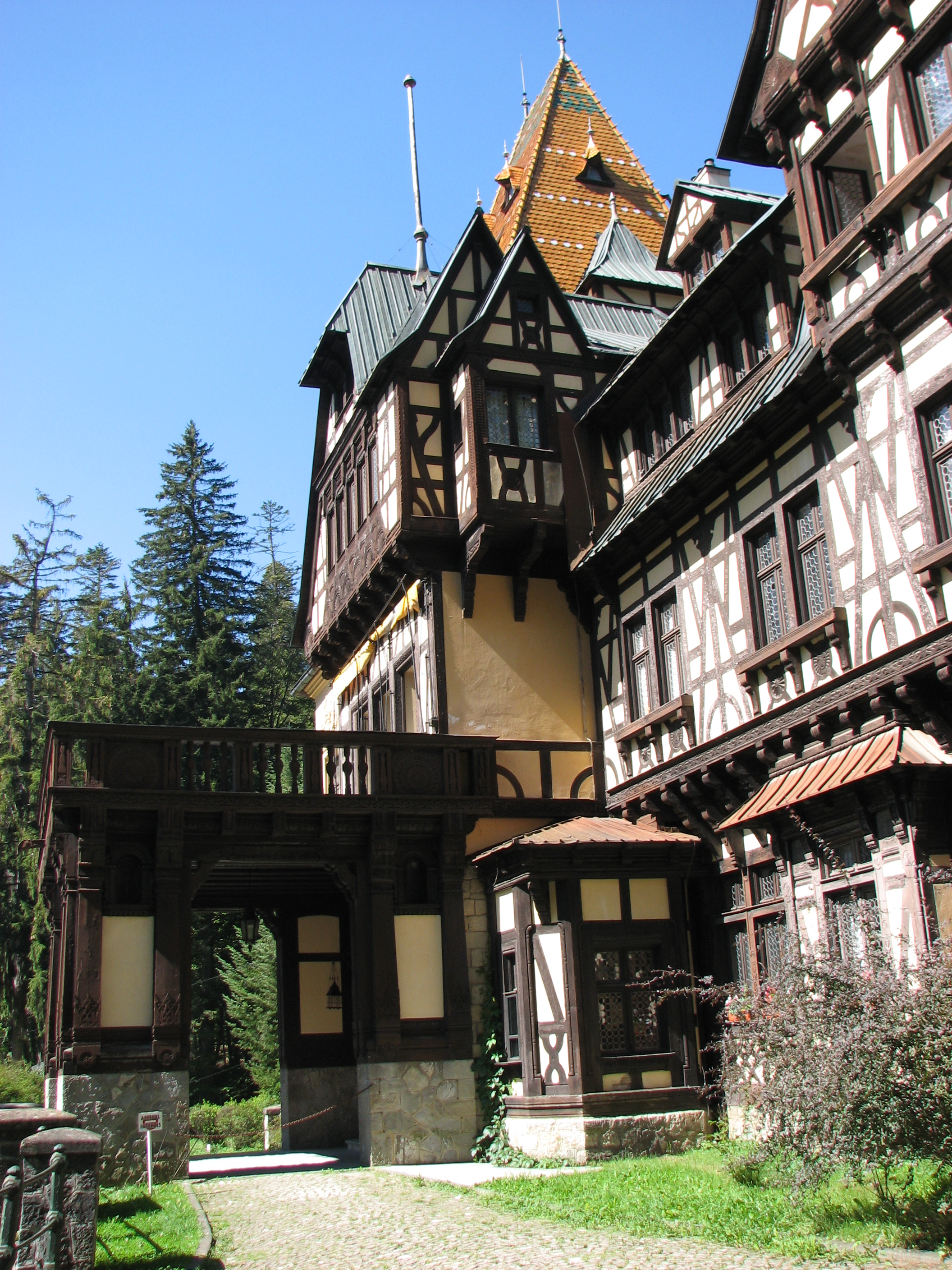 Pelisor Castle